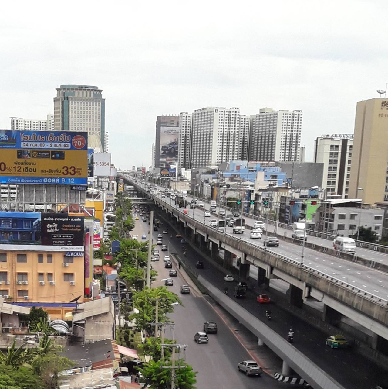 ถนนบรมราชชนนี มิวทัศน์จากรถไฟฟ้ามหานคร สายเฉลิมรัชมงคล